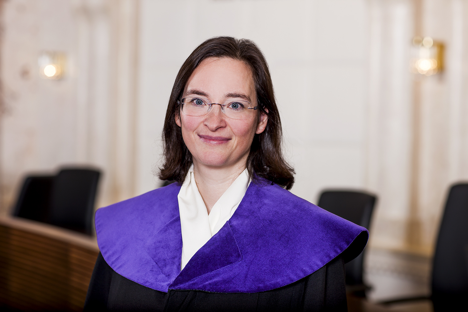 Dr. Barbara Leitl-Staudinger, Ersatzmitglied des österreichischen Verfassungsgerichtshofs seit 2011.